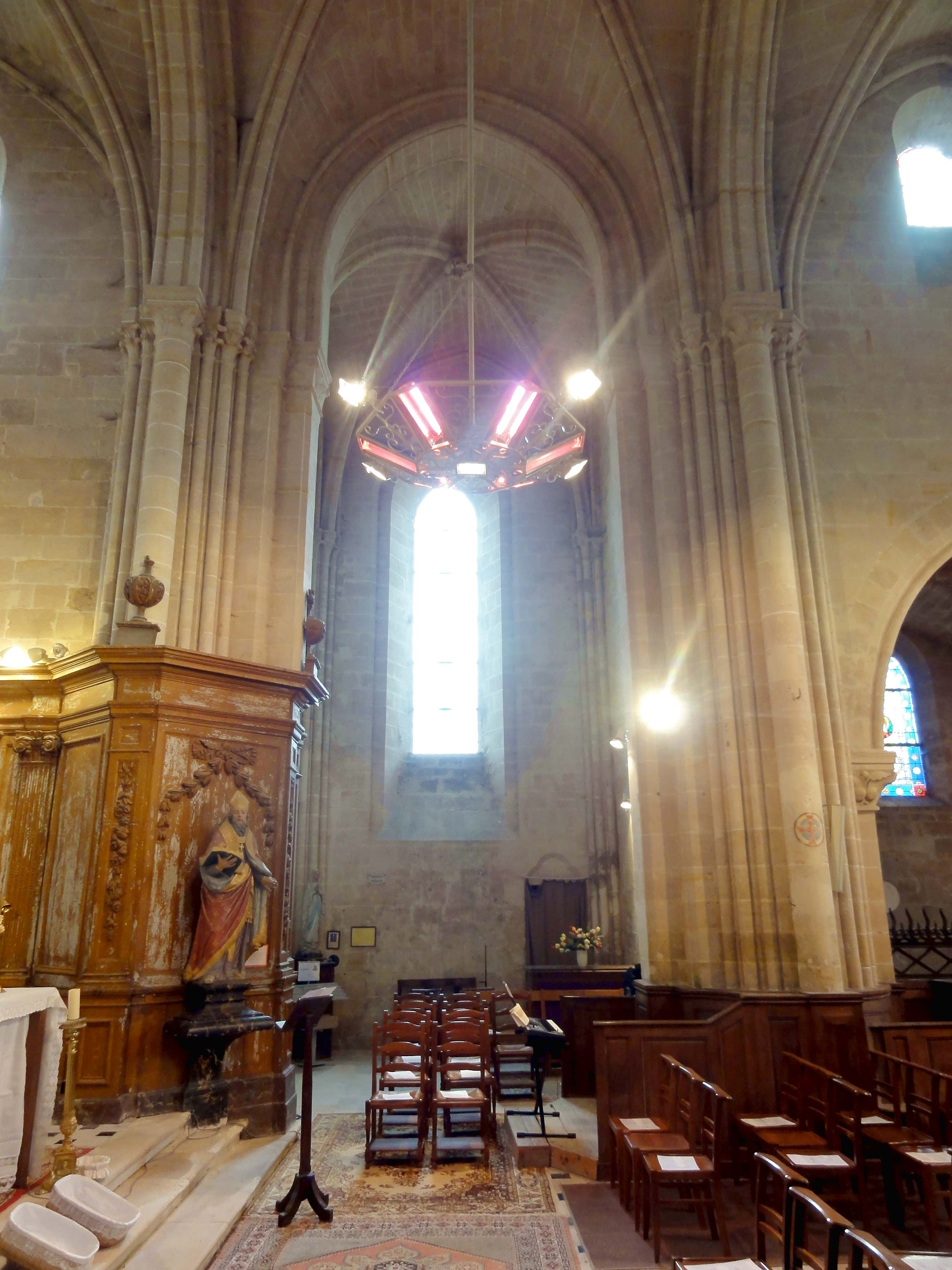 Intérieur de l'église - voir titre.